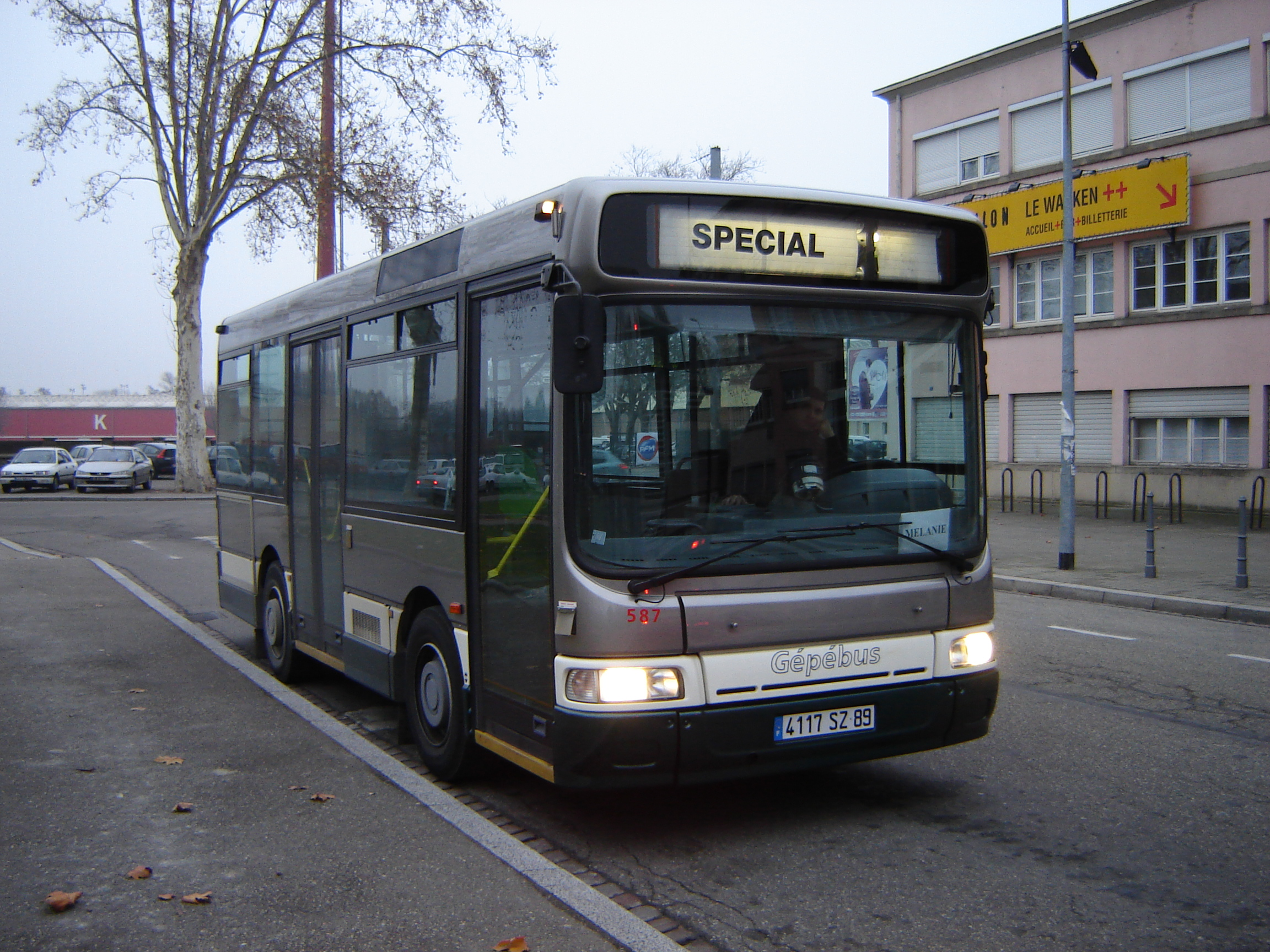 Gépebus Oréos 55 à Strasbourg